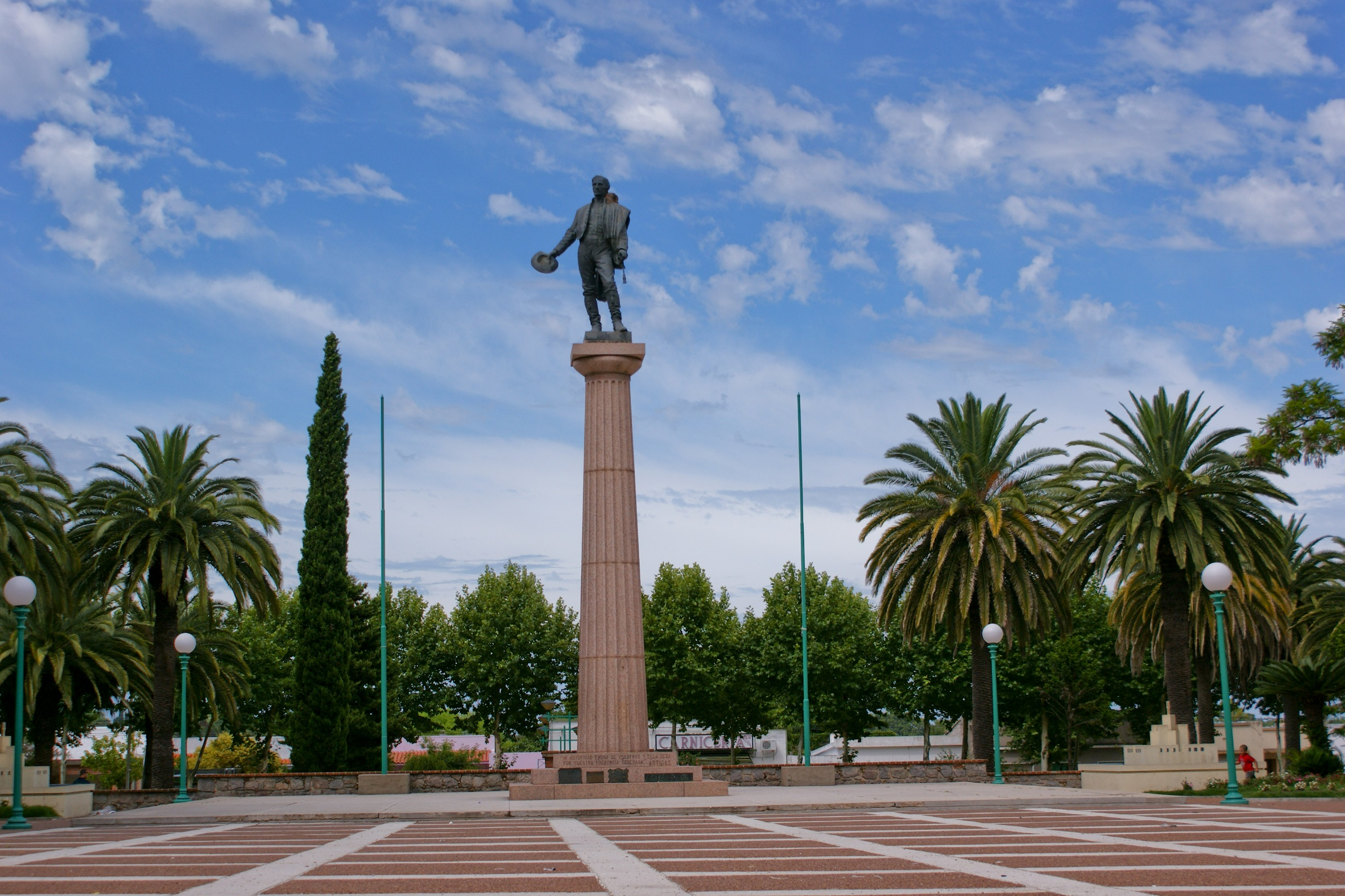 Monumento a Artigas (Fray Bentos). Ubicada en el departamento de Río Negro